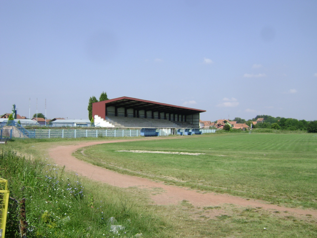 Српски (ћирилица): Стадион ГФК Јасеница, Смедеревска Паланка, Србија.